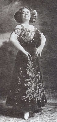 Bild von Rosalia Chalia, einer der ersten Sängerinnen von denen Aufnahmen auf Phonographenwalzen angefertigt wurden.